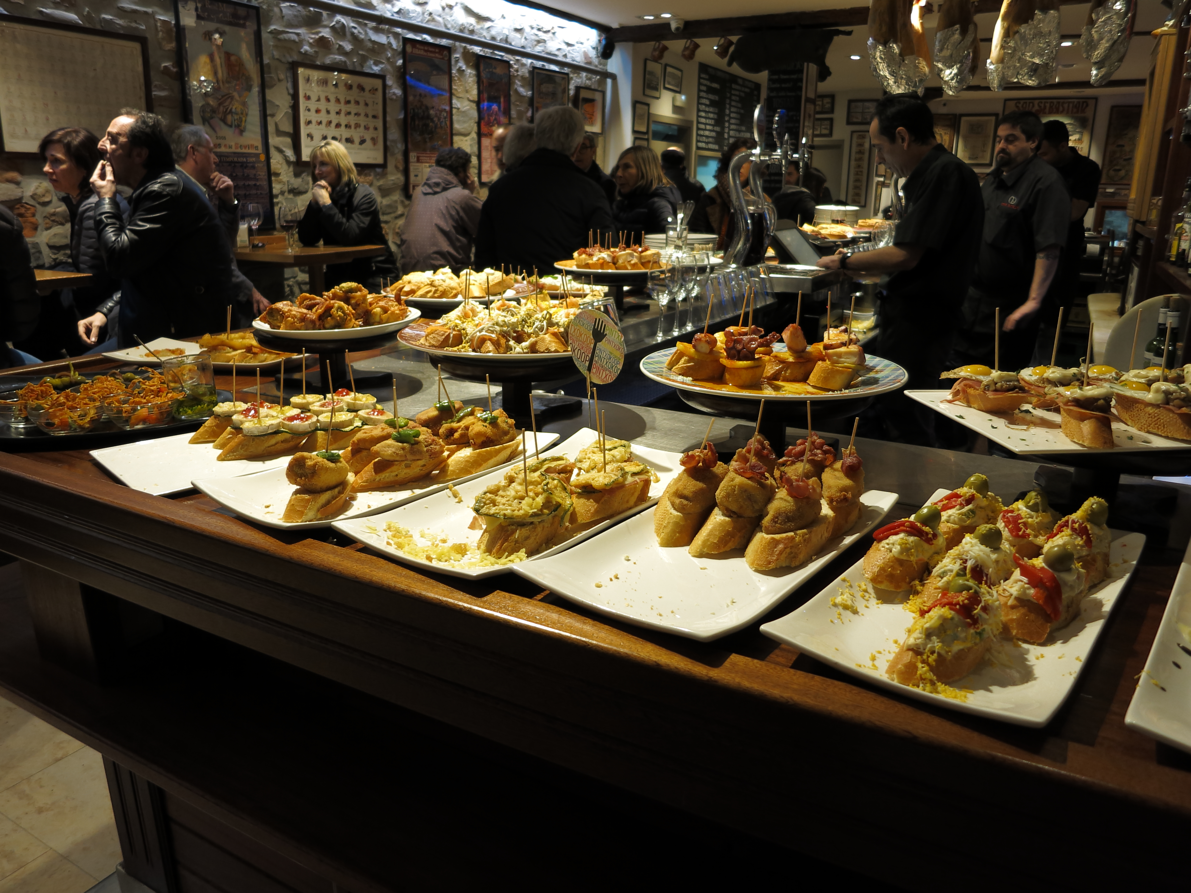 Bar de pinchos en un bar de Donostia-San Sebastián, País Vasco, España